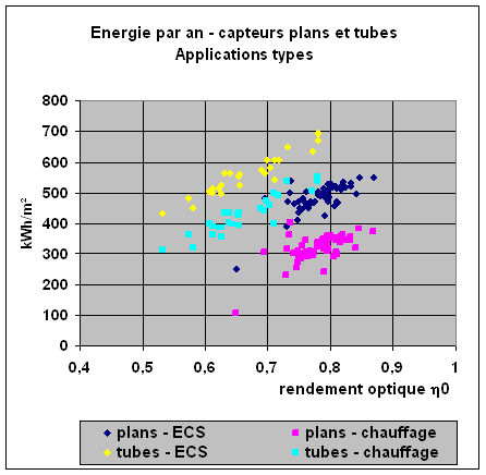 Exemples de résultats d'énergie thermique annuelle obtenue avec des capteurs solaires, dans des applications types